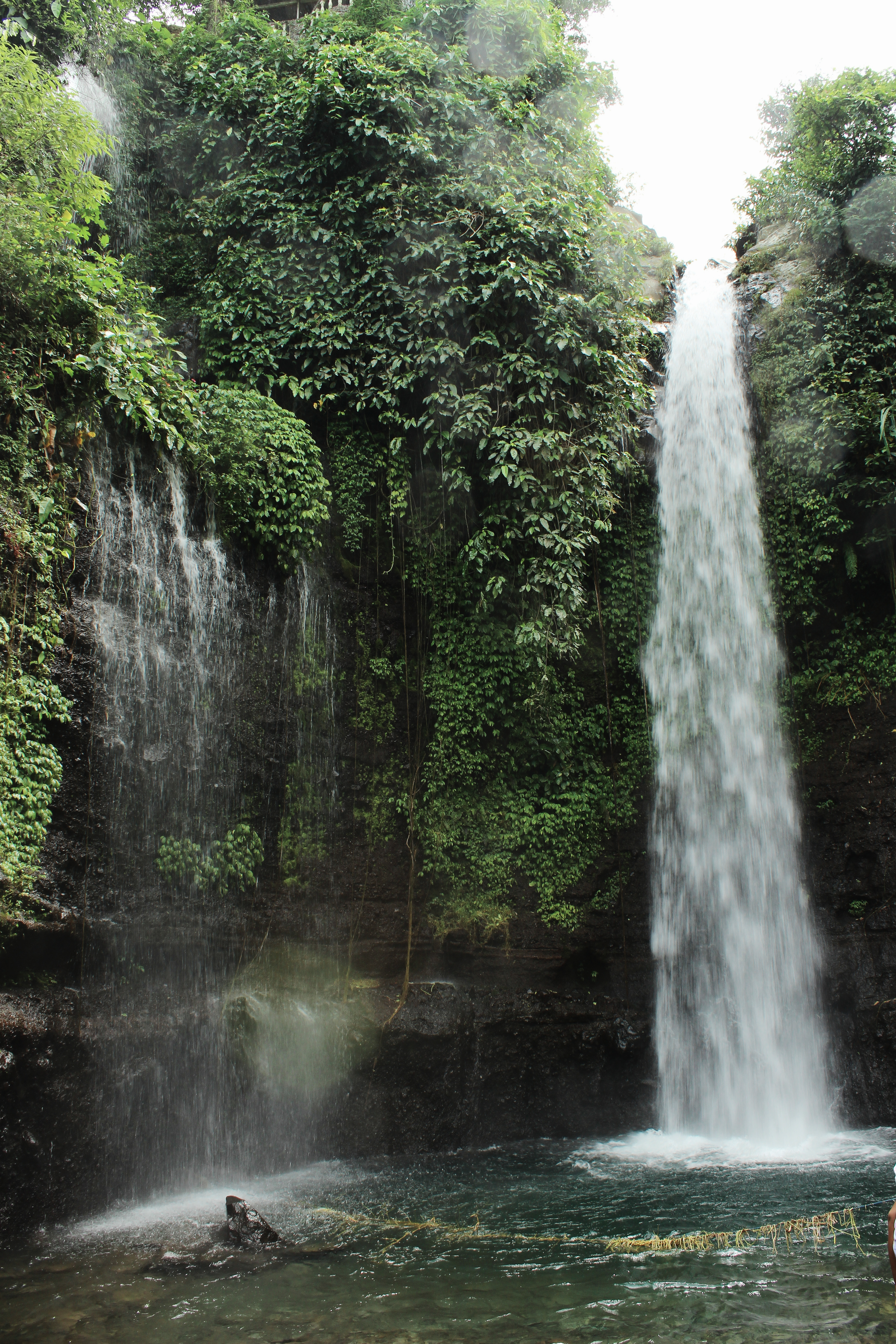 Curug luhur adalah nama sebuah air terjun yang berada di kaki Gunung Salak, Bogor, Jawa Barat, Indonesia. Curug ini berada di ketinggian 62,4 meter di atas permukaan laut. Keistimewaan curug ini adalah memiliki dua buah air terjun yang sejajar (kembar) serta pemandangan alam dan udara yang segar yang bisa membuat wisatawan tenang dan rileks karena jauh dari kepenatan ibu kota.